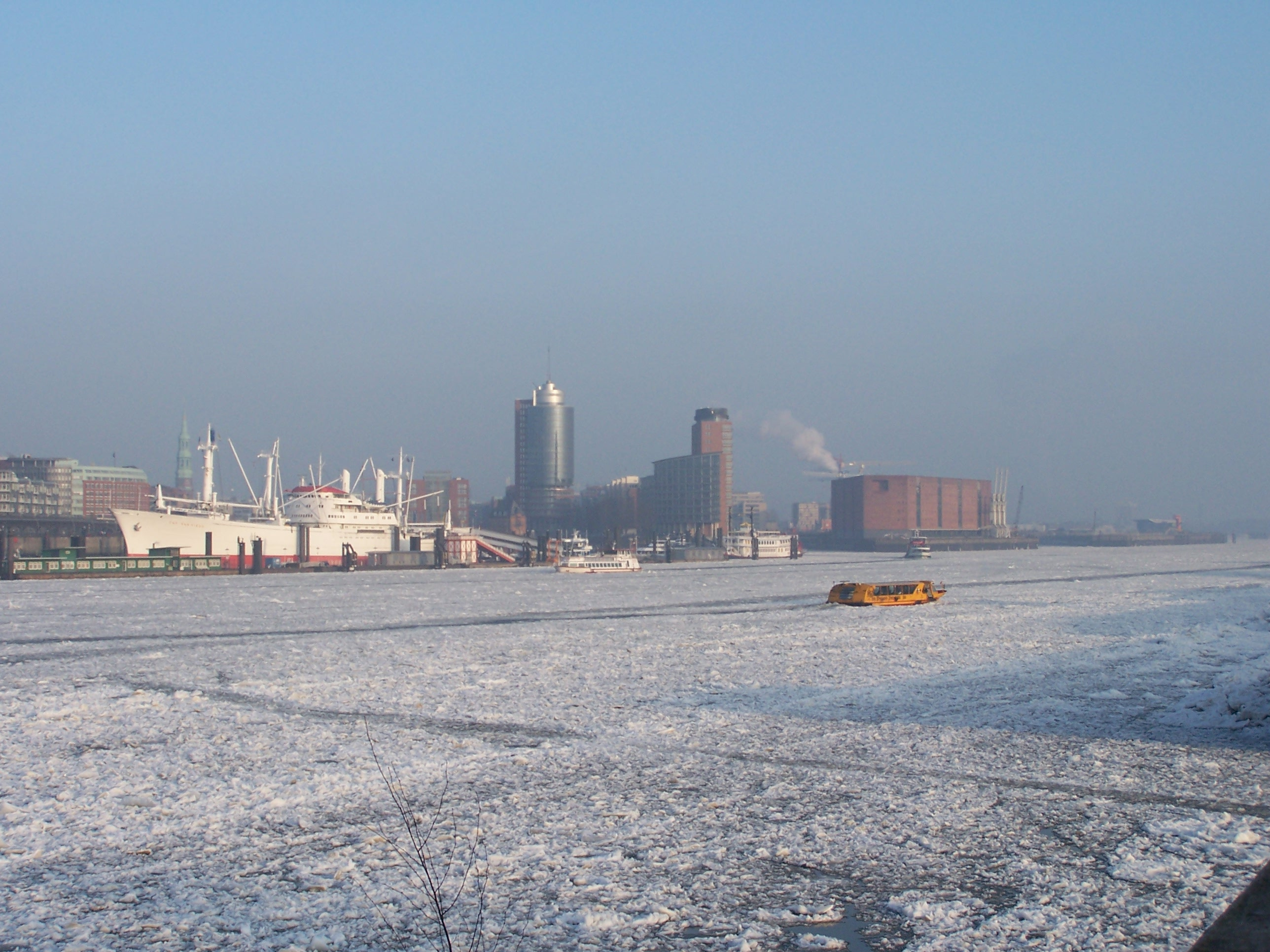 Kaispeicher A, Hanseatic Trade Center und Cap San Diego bei Eisgang auf der Elbe